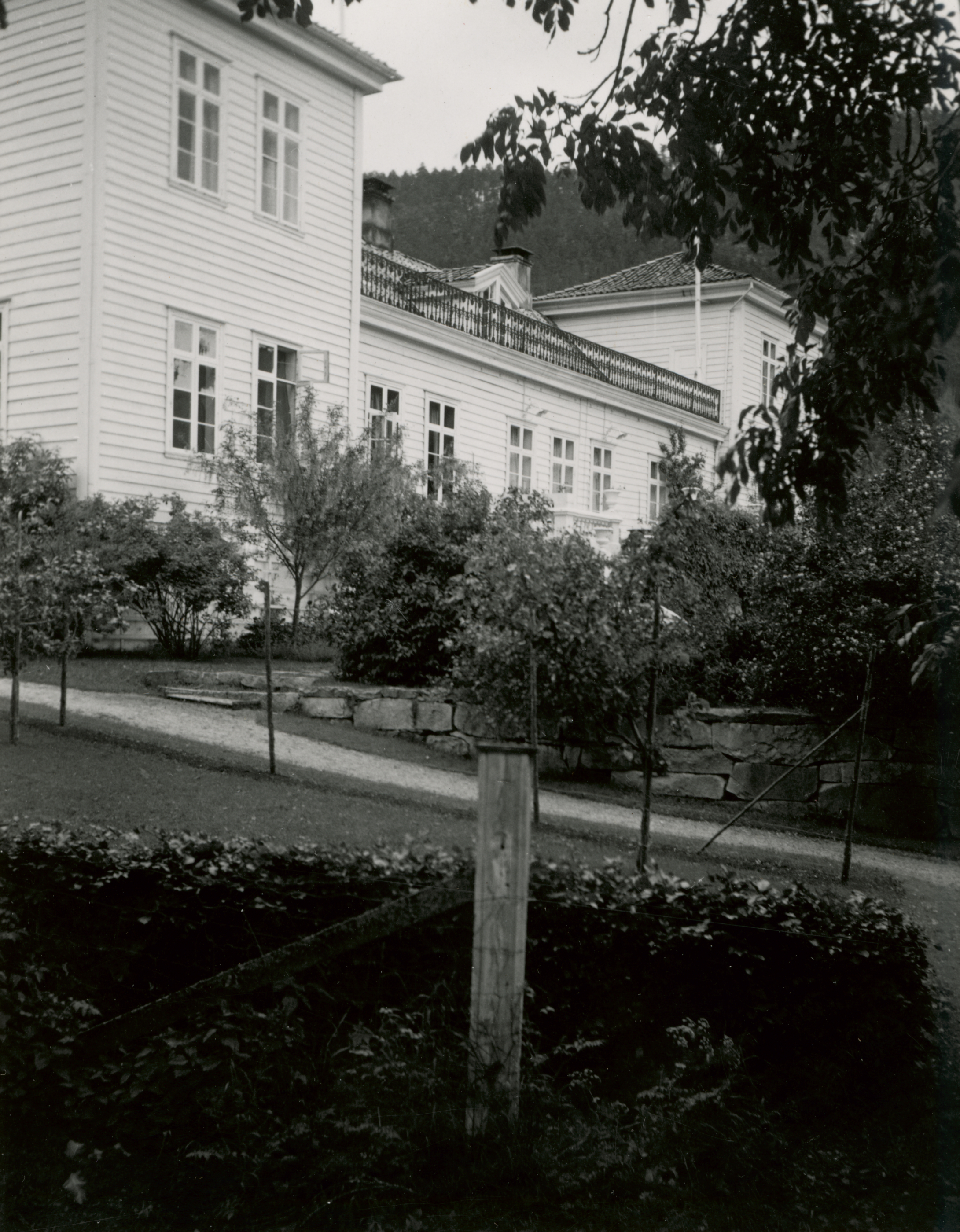 Kaupanger hovedgård i Kaupanger, Sogn og Fjordane fredet